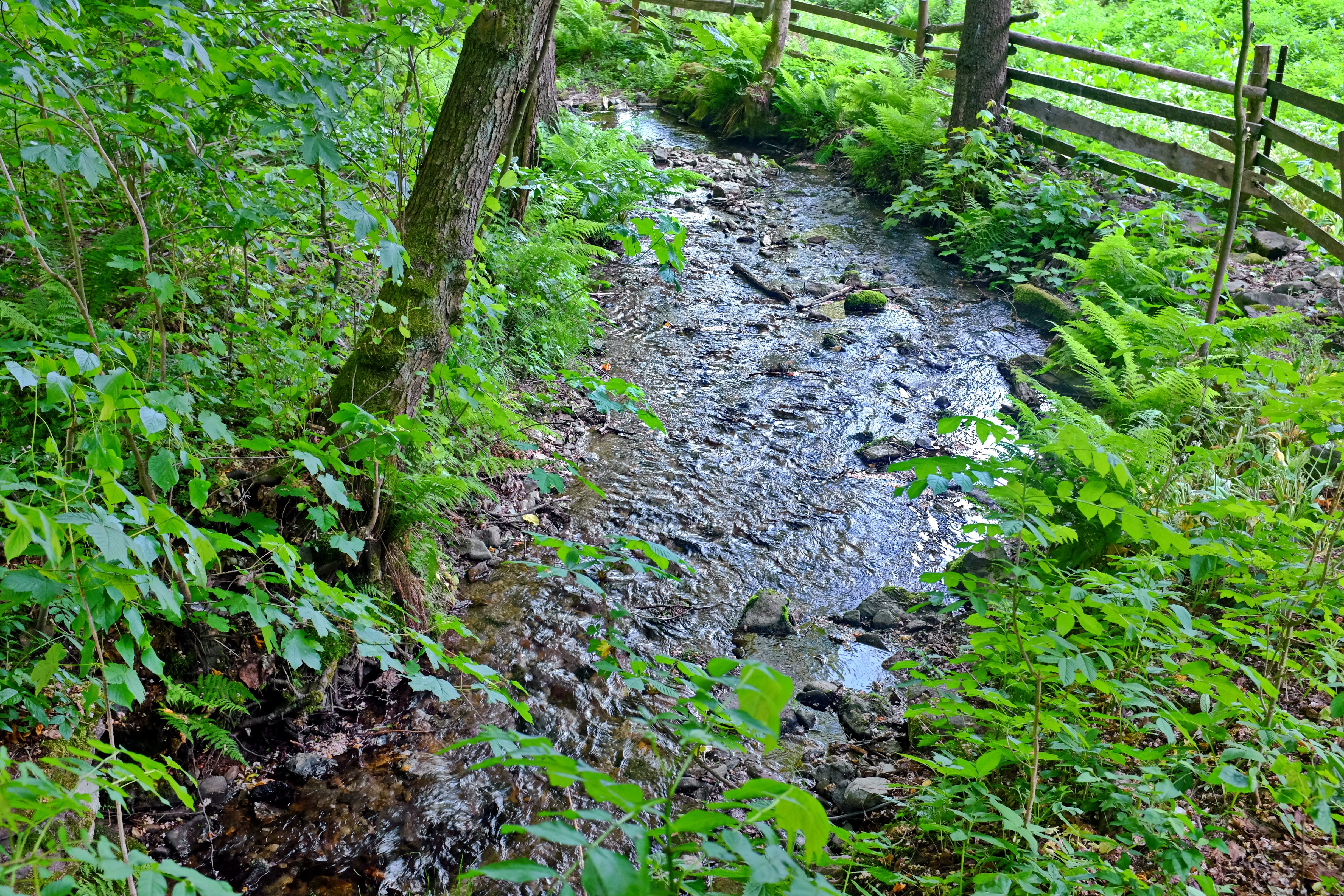 Pekelský potok, v osadě Peklo (Stráž nad Ohří), přítok Ohře, okres Karlovy Vary